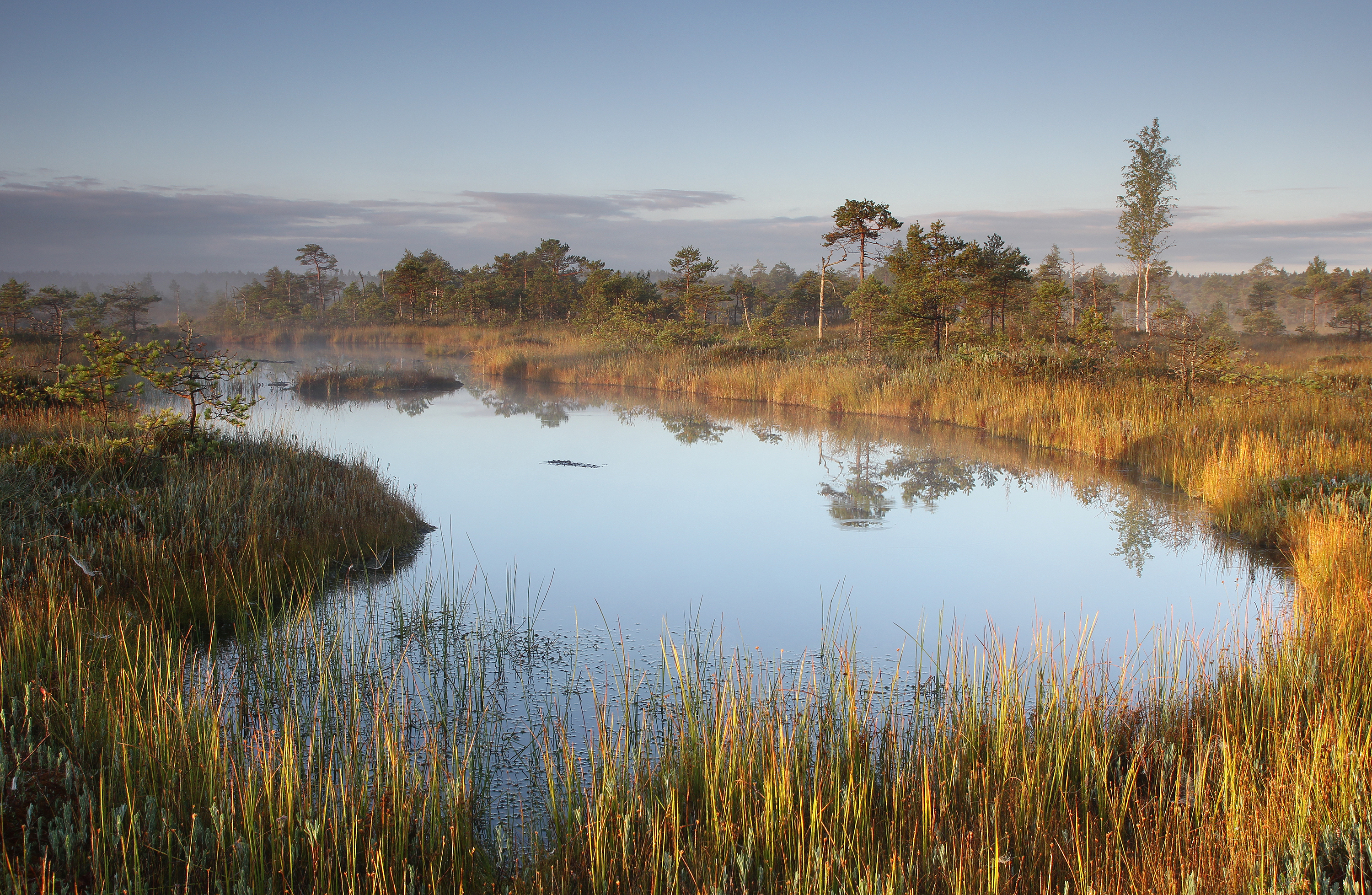 "Hommik laukaserval". Pildistatud on Endla LK alal Männikjärvel.